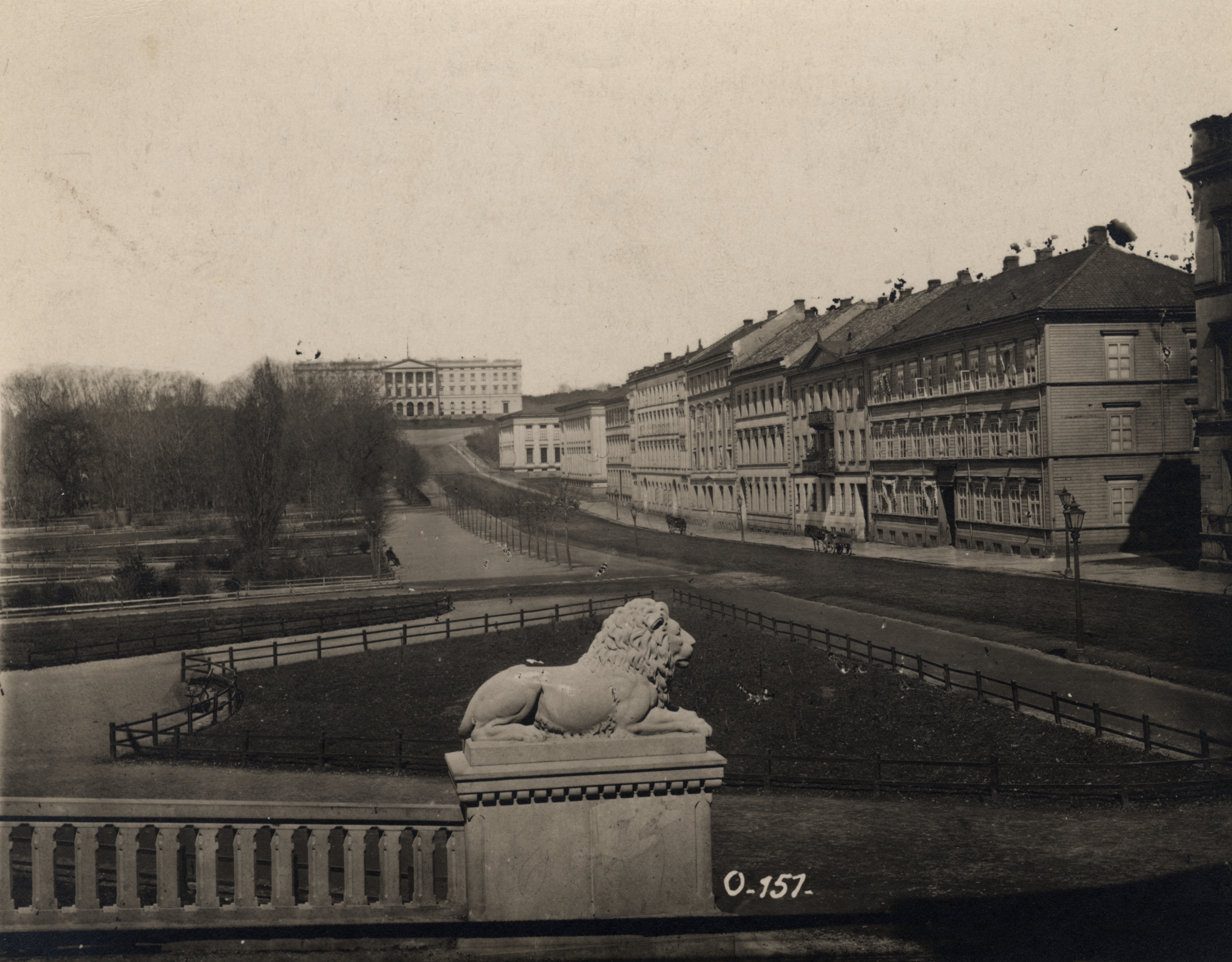 Karl Johans gate i Oslo, Oslo Byen sett fra Løvebakken